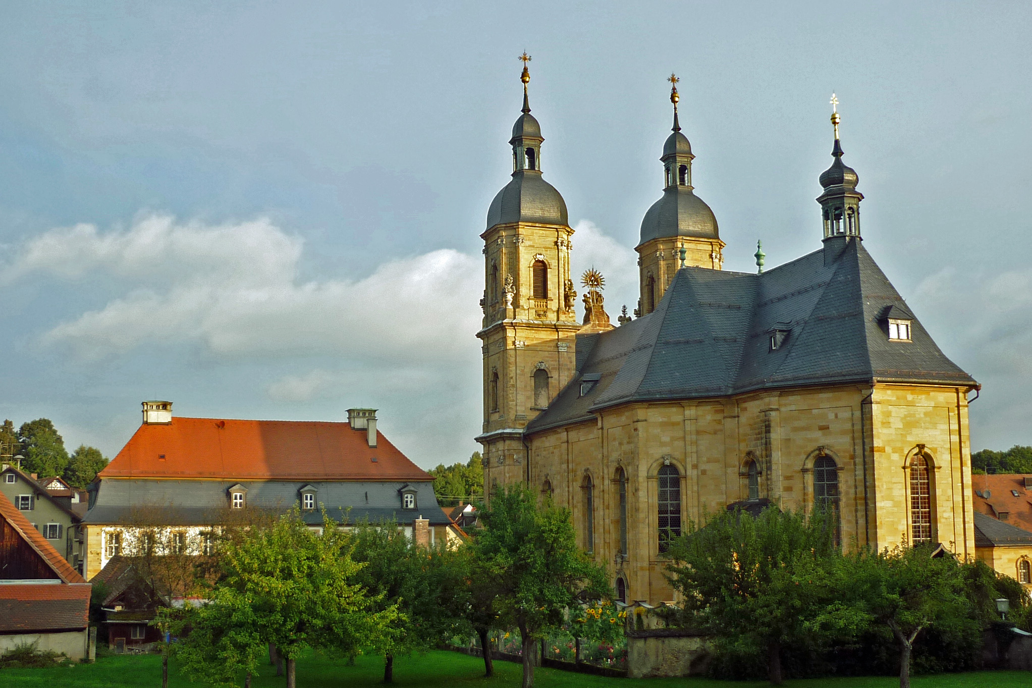 Basilika Gößweinstein mit Pfarrhaus